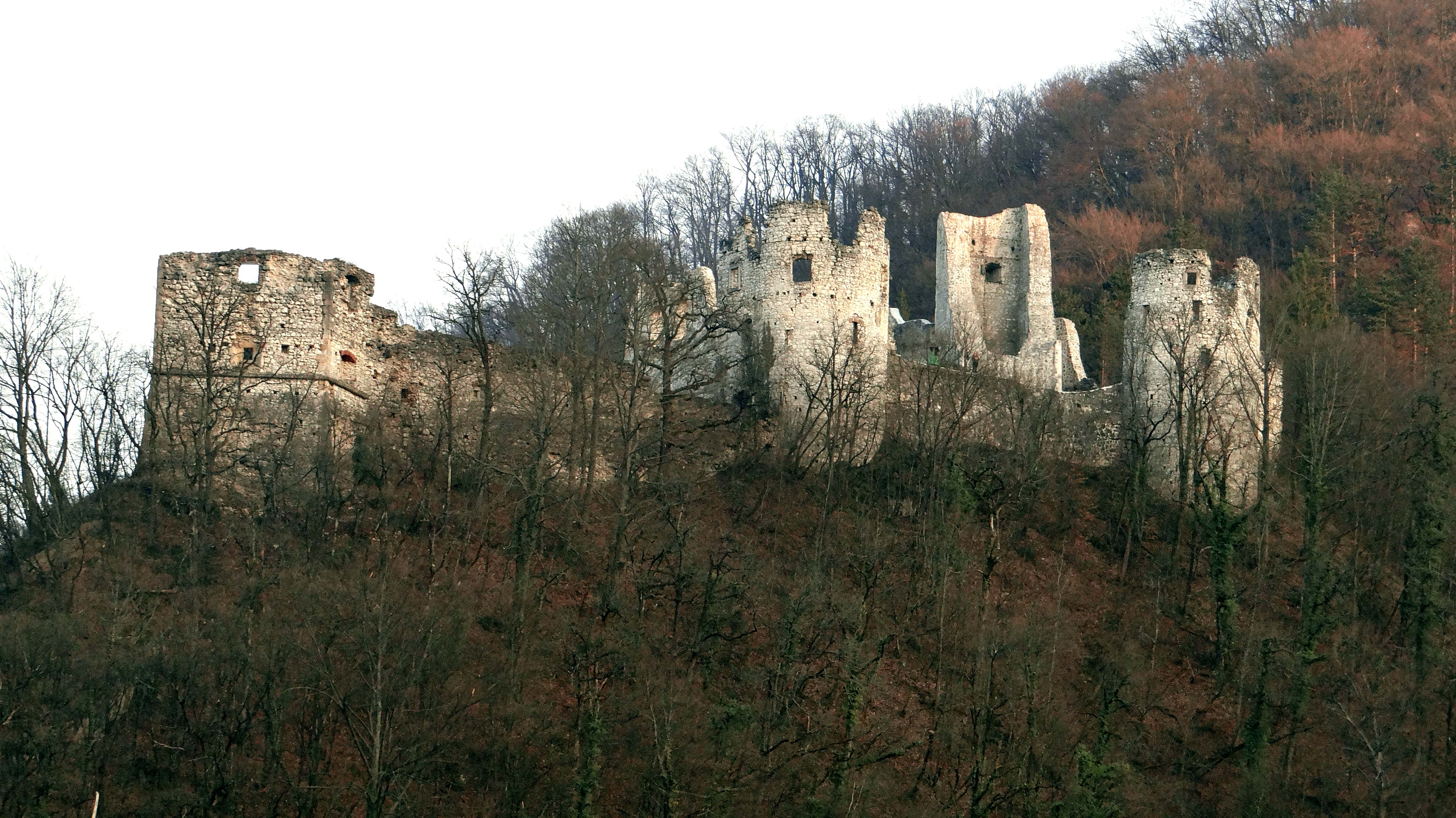 Stari grad Samobor VII. 2014